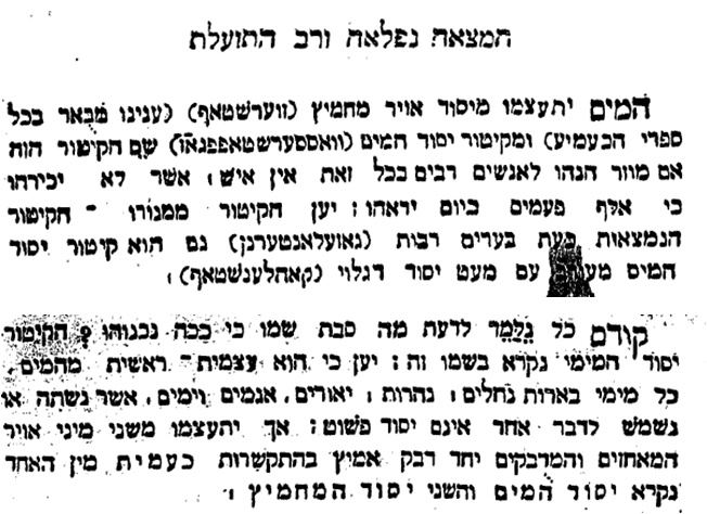 תיאור ארכאי על הכימיה של המים, ועל דרכים להשגת תגובה כימית להפרדת המימן מהמים, בעיתון עברי משנת 1856